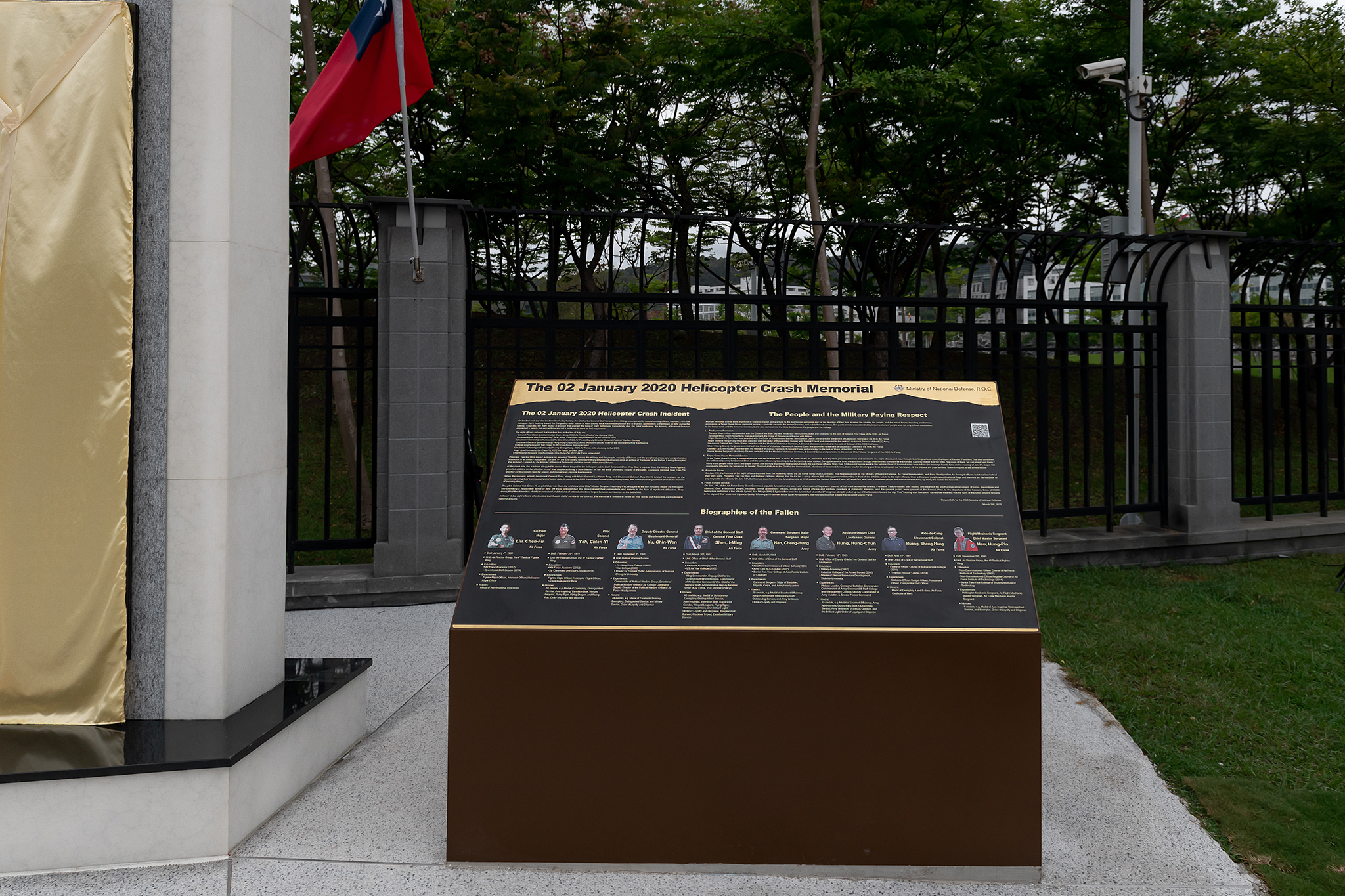 中文（台灣）: 2020年中華民國空軍UH-60M黑鷹直升機墜毀事故殉職將士紀念專區紀念碑。